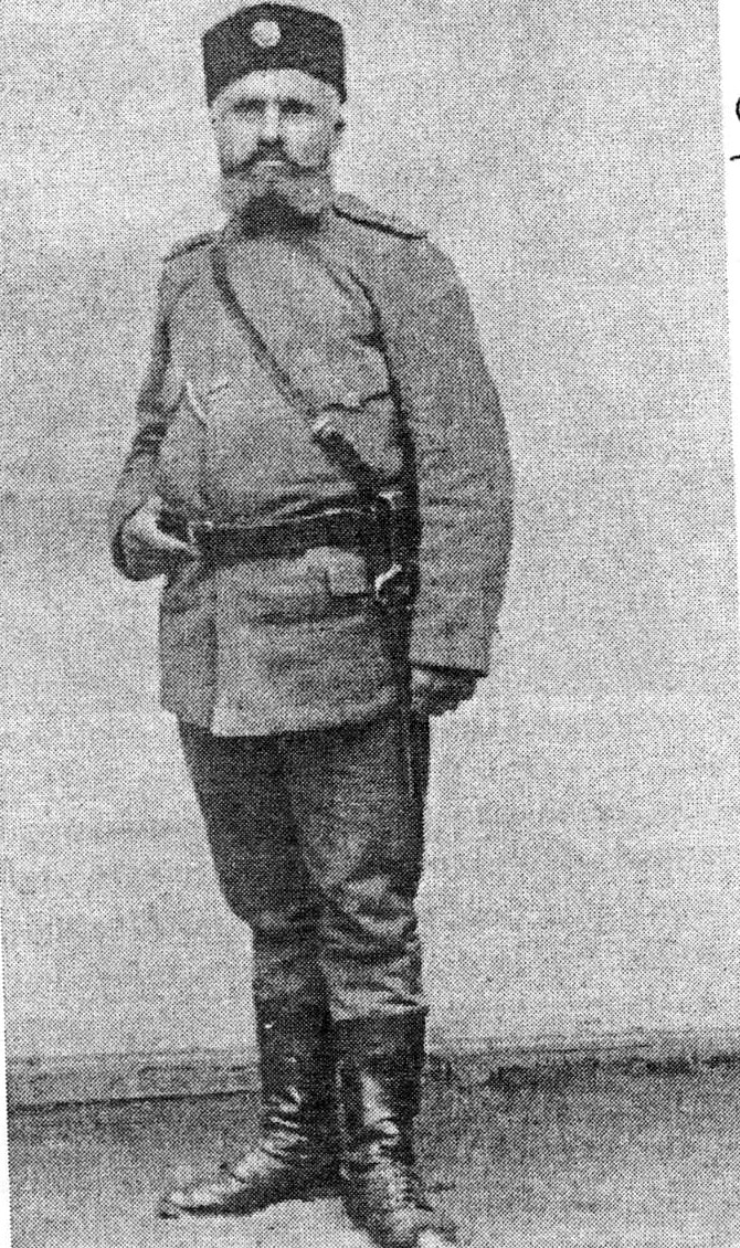 Ivan Karadzhov